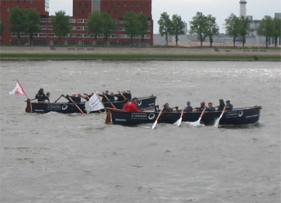 Op deze eigen gemaakte foto zijn de teams STC-1 en STC-2 te zien van het Scheepvaart en Transport College te Rotterdam. Zij roeien in respectievelijk de sloepen Evert Deddes en Anthony van Hoboken op de Maas in Rotterdam.